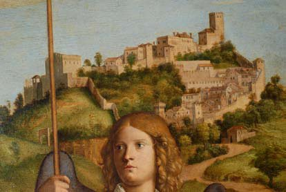 Madonna col Bambino tra i santi Michele Arcangelo e Andrea - particolare